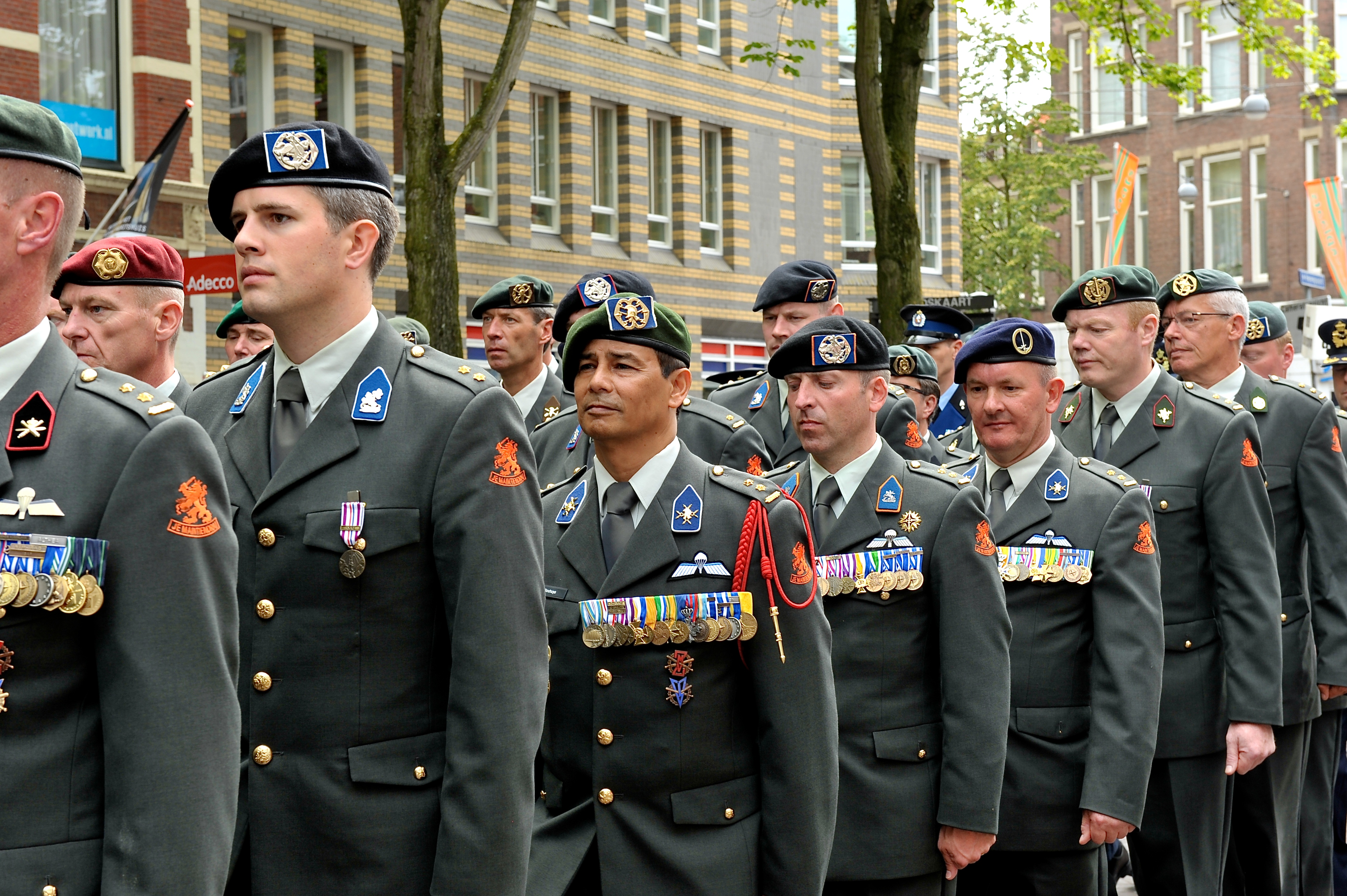 Gedecoreerde militairen